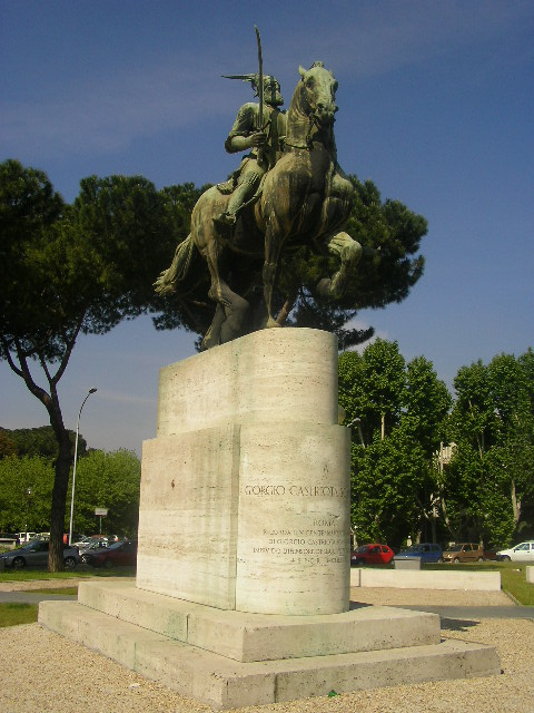 Statua equestre dedicata a Giorgio Castriota Scanderbeg, a Roma, in Piazza Albania, opera di Romano Romanelli